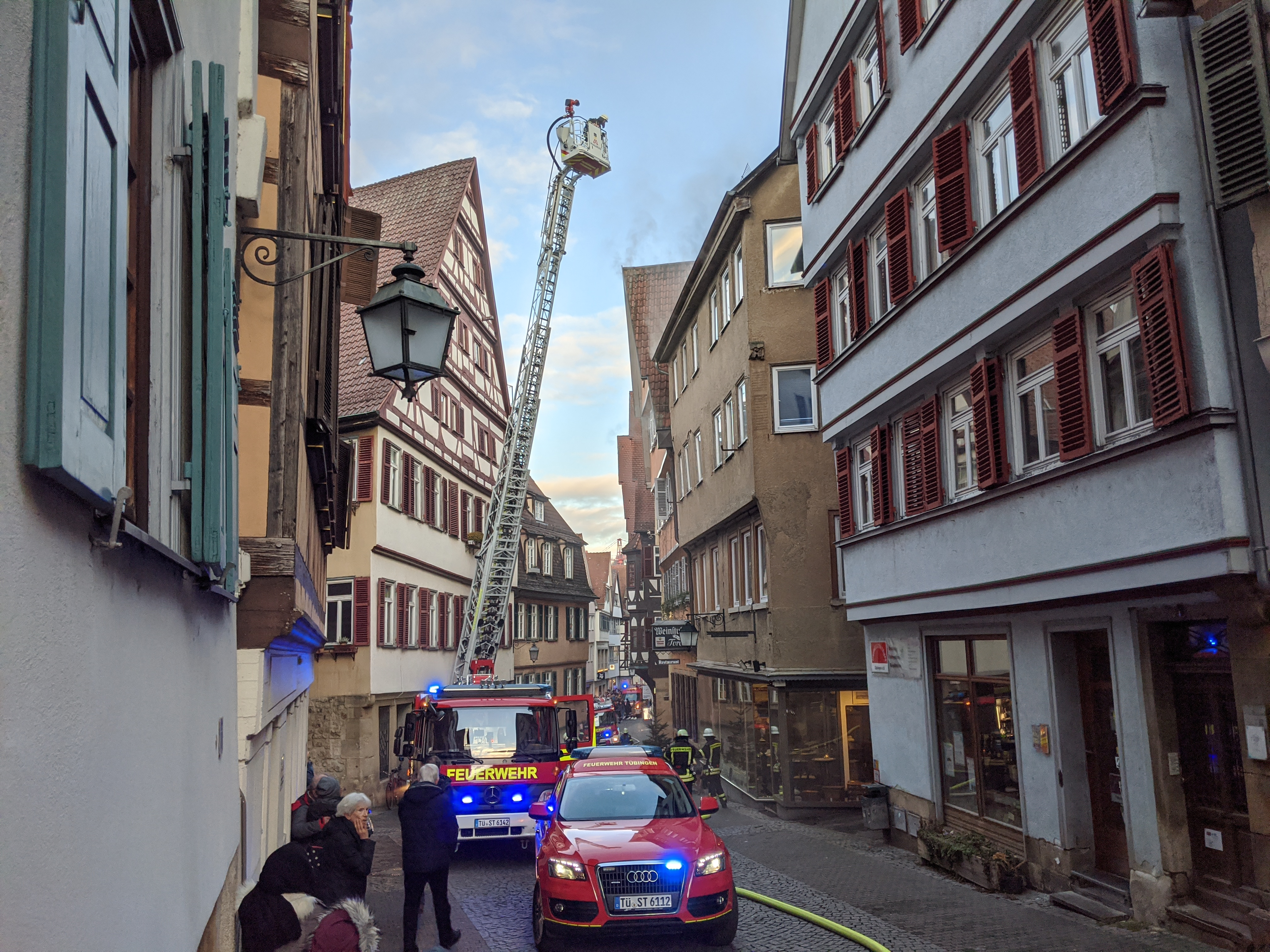 Feuerwehr-Einsatz bei Dachstuhlbrand in der Kronenstraße in Tübingen am 21.12.2019